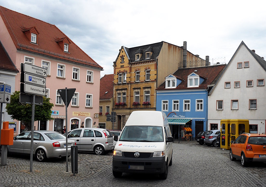 Der Ziegenbalgplatz in Pulsnitz